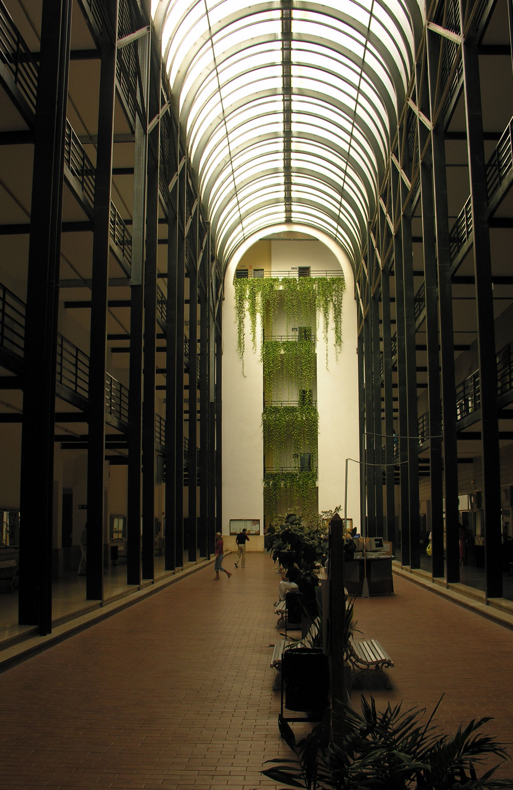 Facultad de Economía y Empresariales de Sevilla.